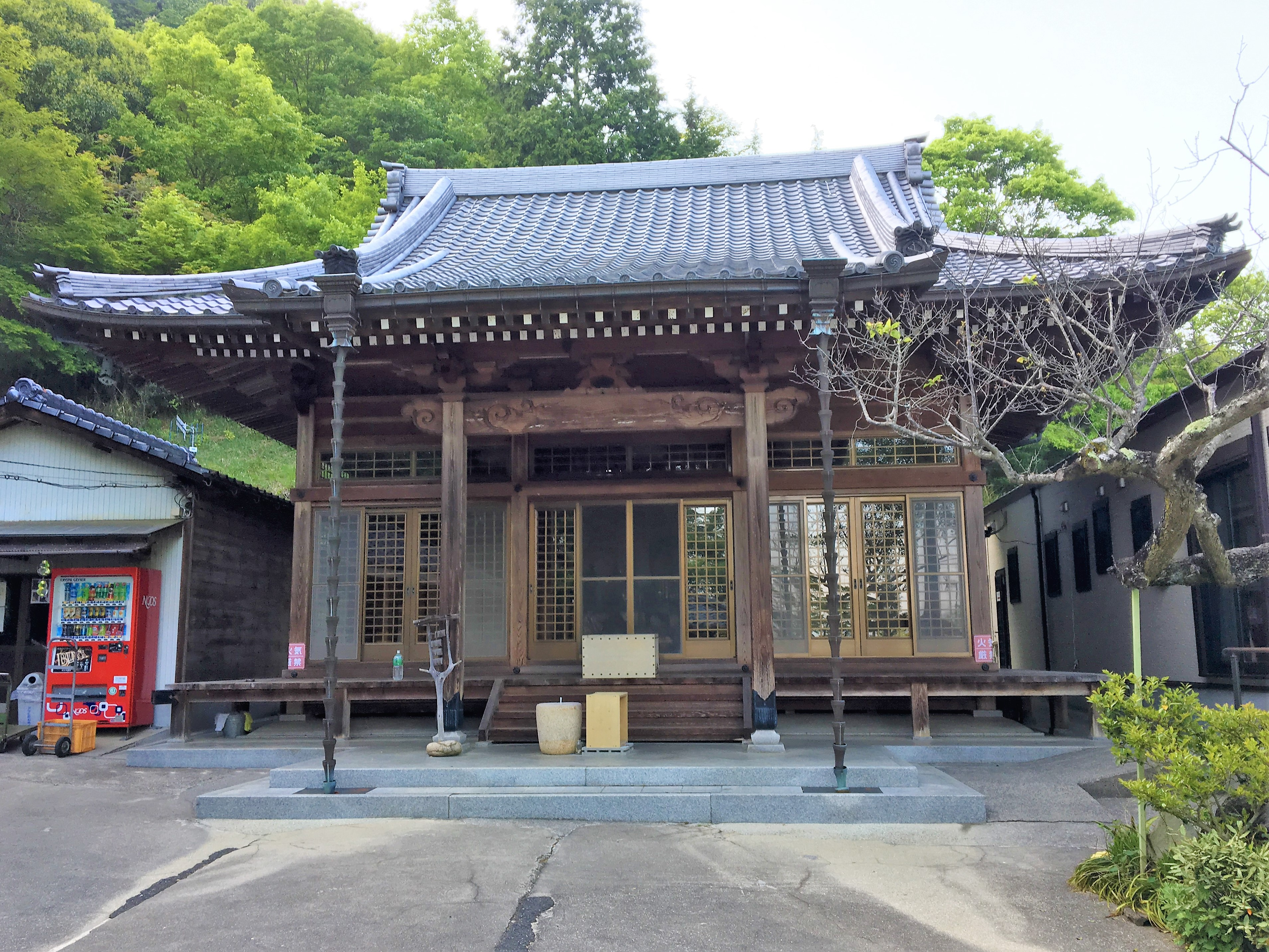 俄山弘法大師堂 本堂（おがみ堂）